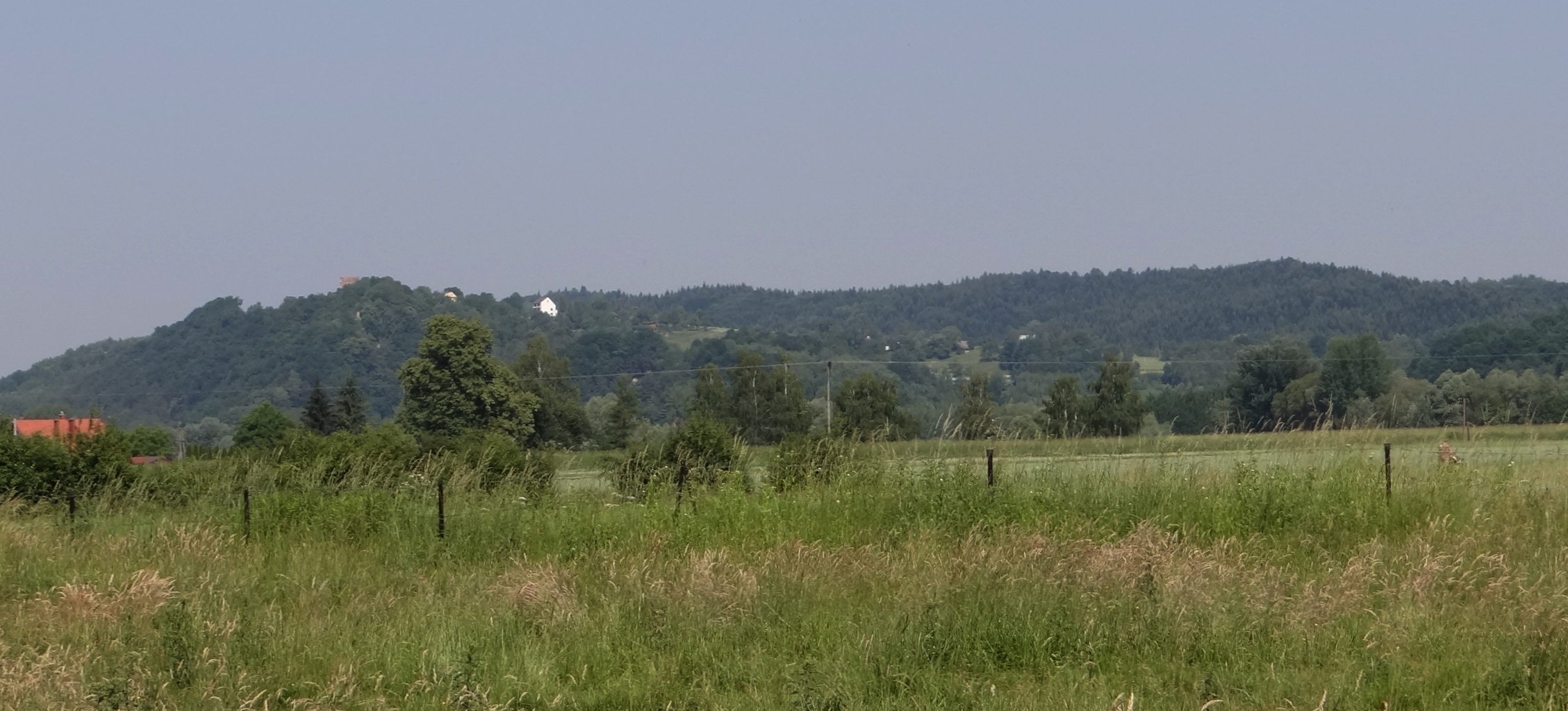 Widok z Zakliczyna na wzgórze Zamczysko z ruinami zamku w Melsztynie